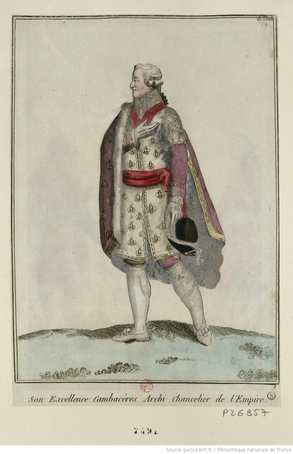 Estampe colorée.